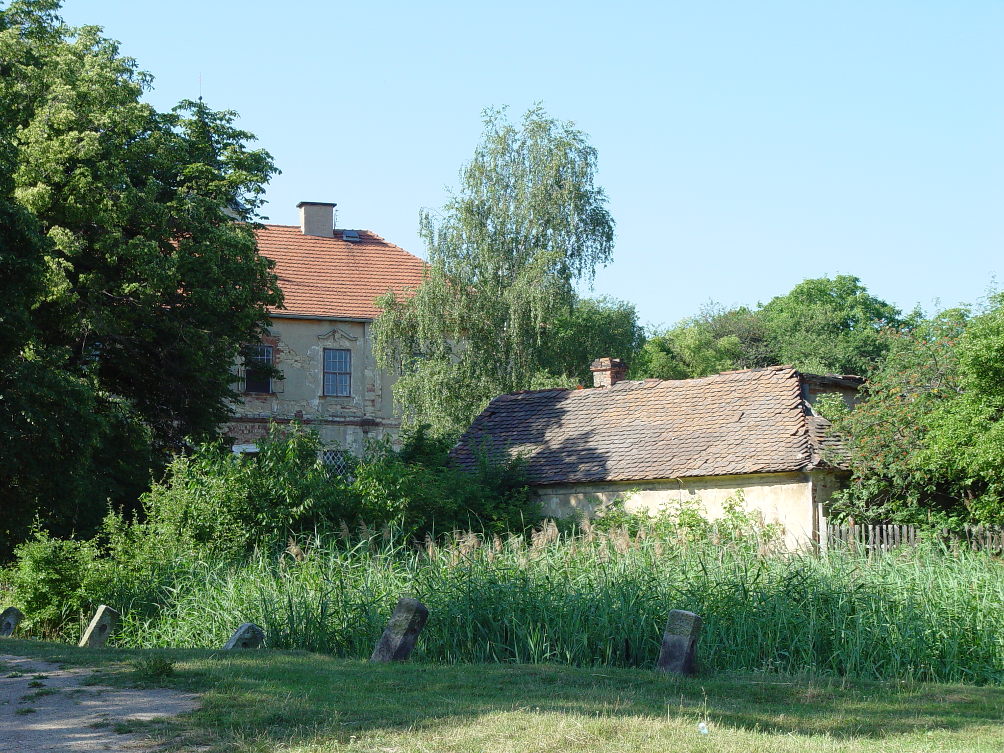 Fara (Havraň), Havraň 17